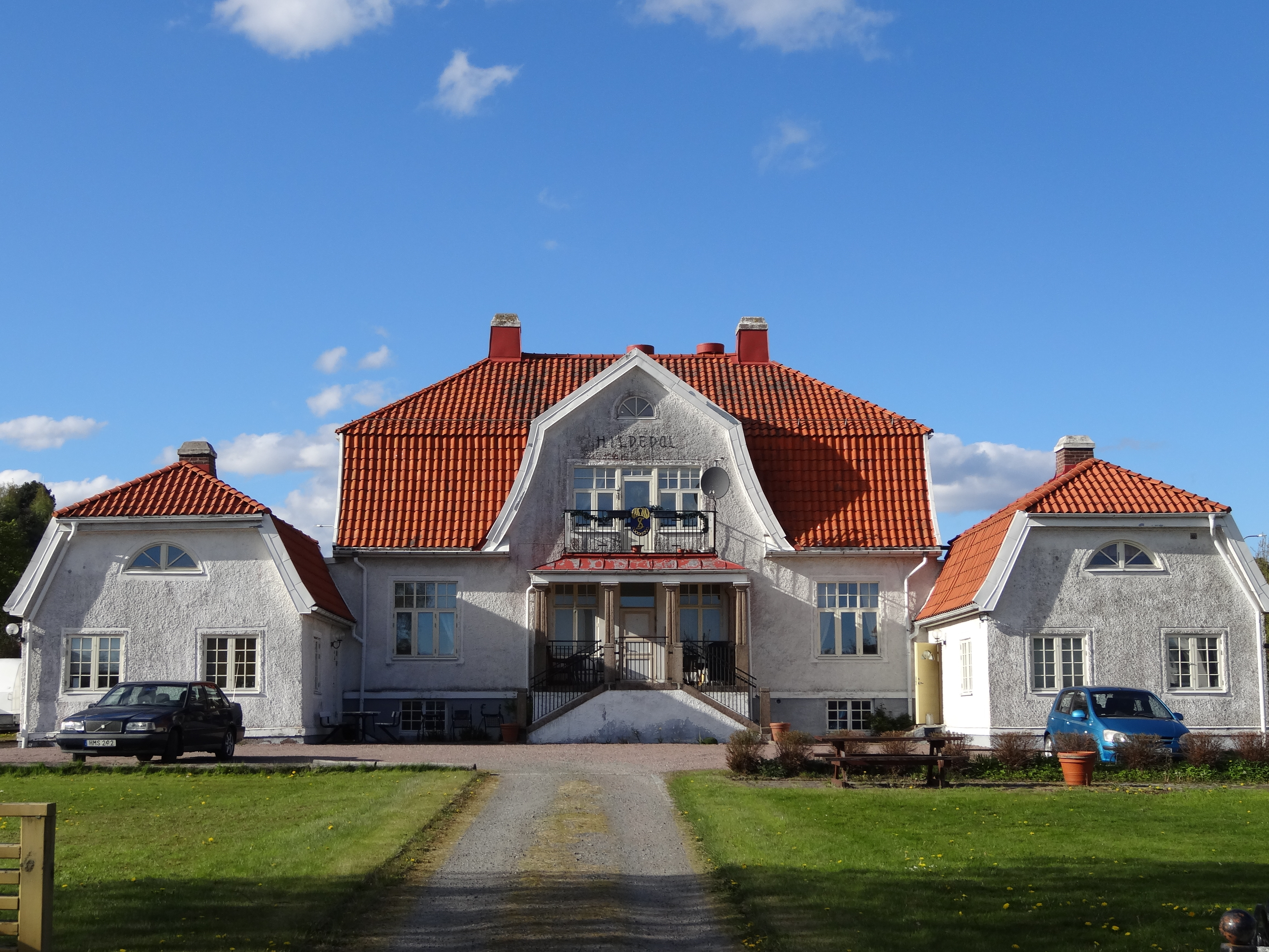 Hildedals gård (Tuve 15:33), Växthusvägen 60, Göteborg. Byggnadsår 1919.